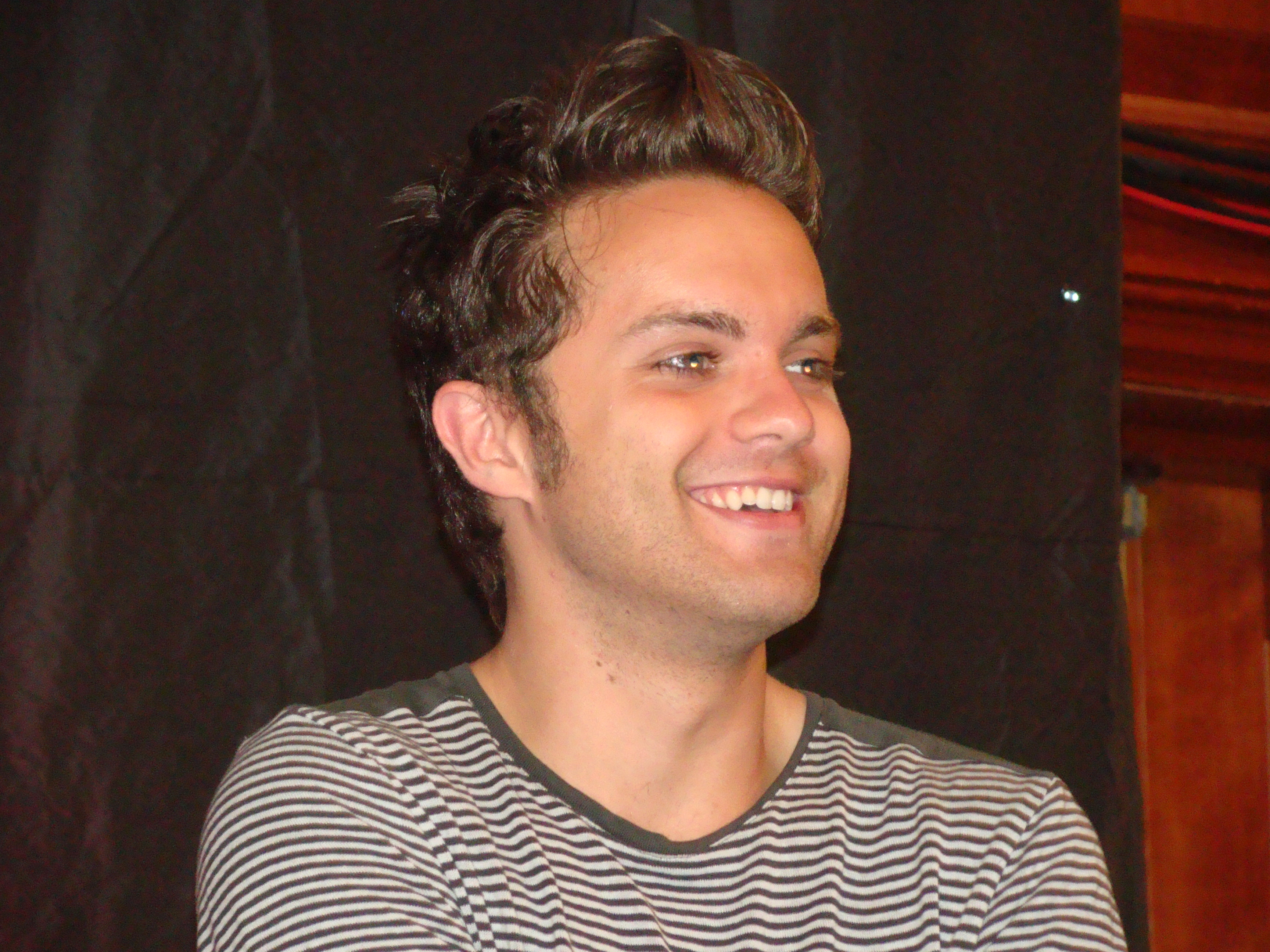 Thomas Dekker June 2011